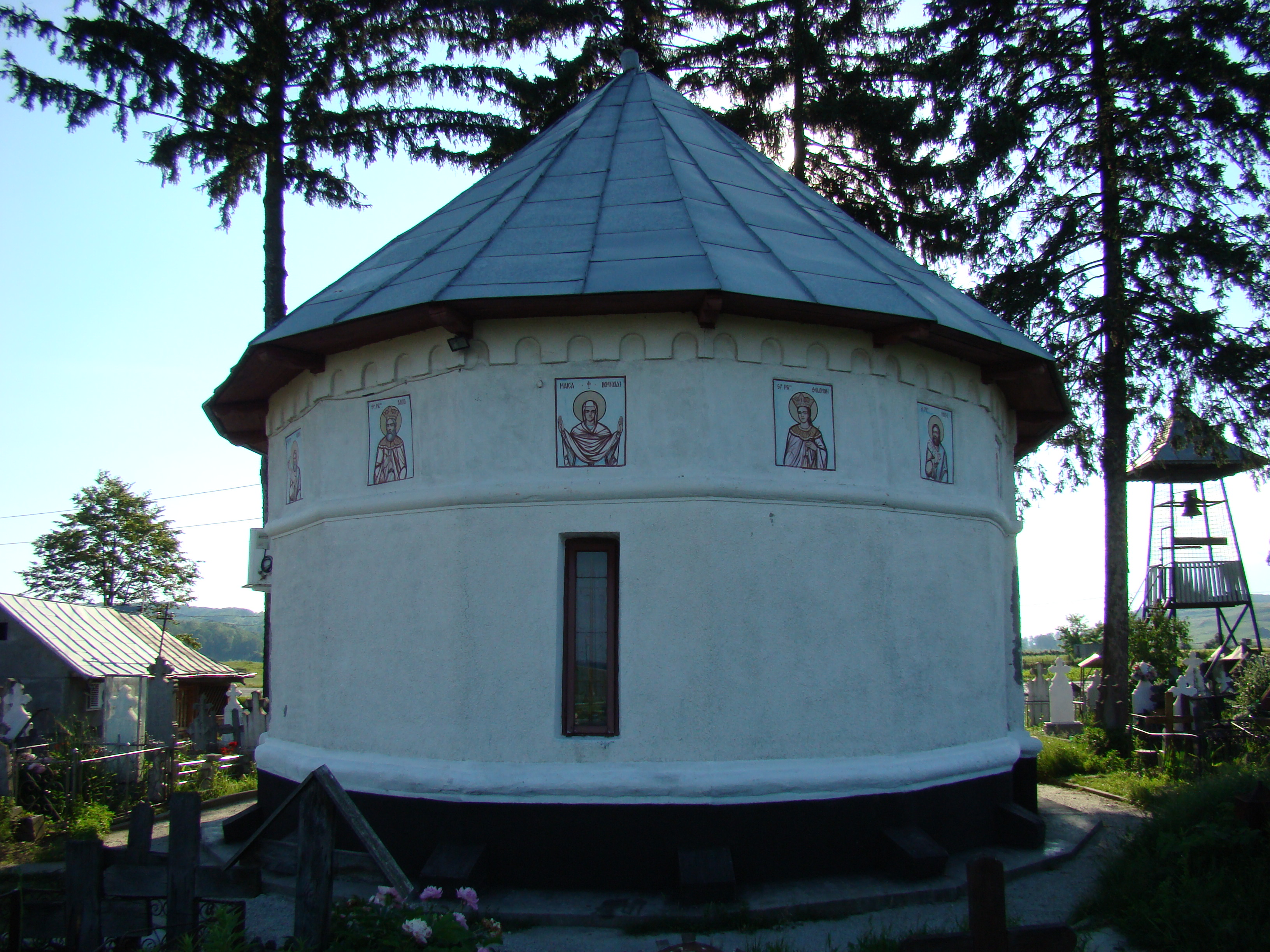 Biserica monument „Sf.Mare Mucenic Dimitrie”, oraș Băbeni